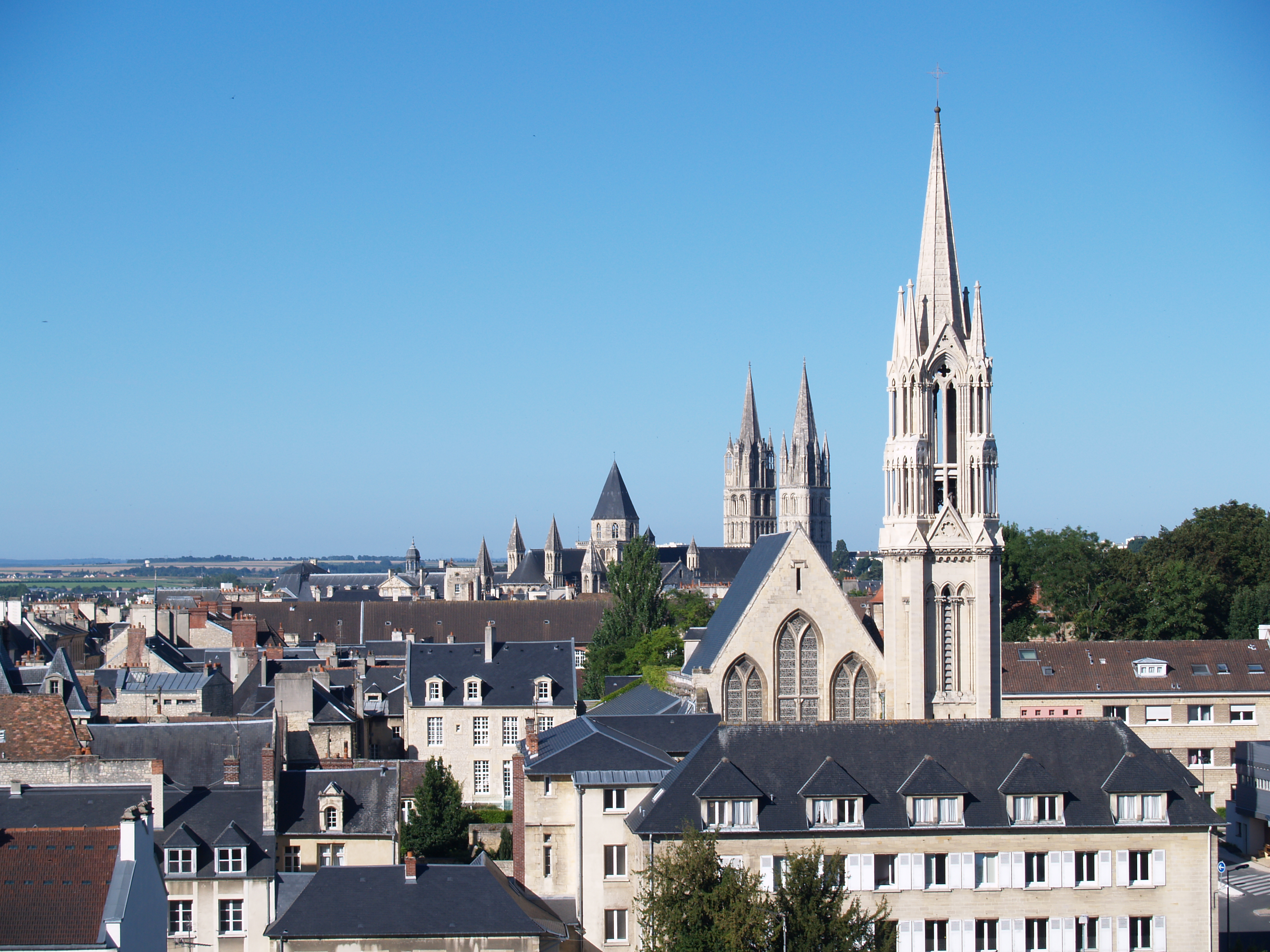 vue de Caen (Calvados, Basse-Normandie) depuis le château.